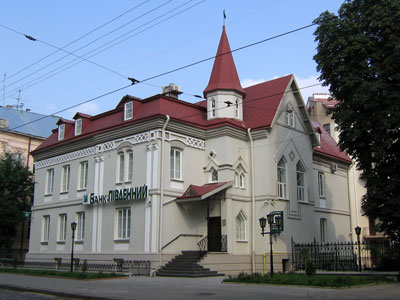 Будинок банку “Південний” у Львові (вул. Чупринки, 11). архітектор Іван Левинський